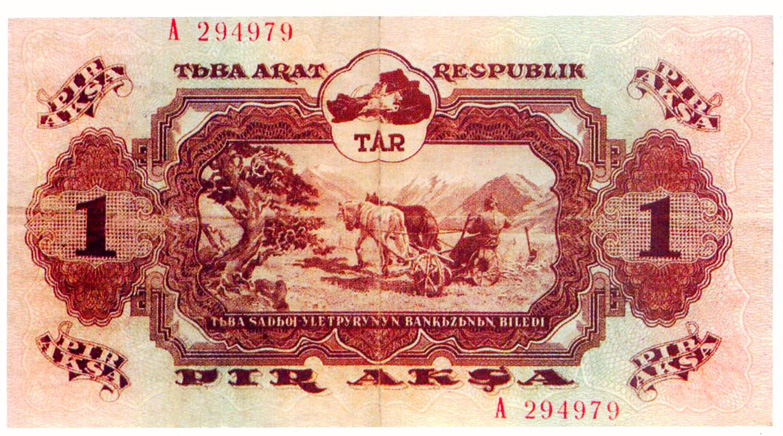 Тыва дыл: Тыва акша (аверс)